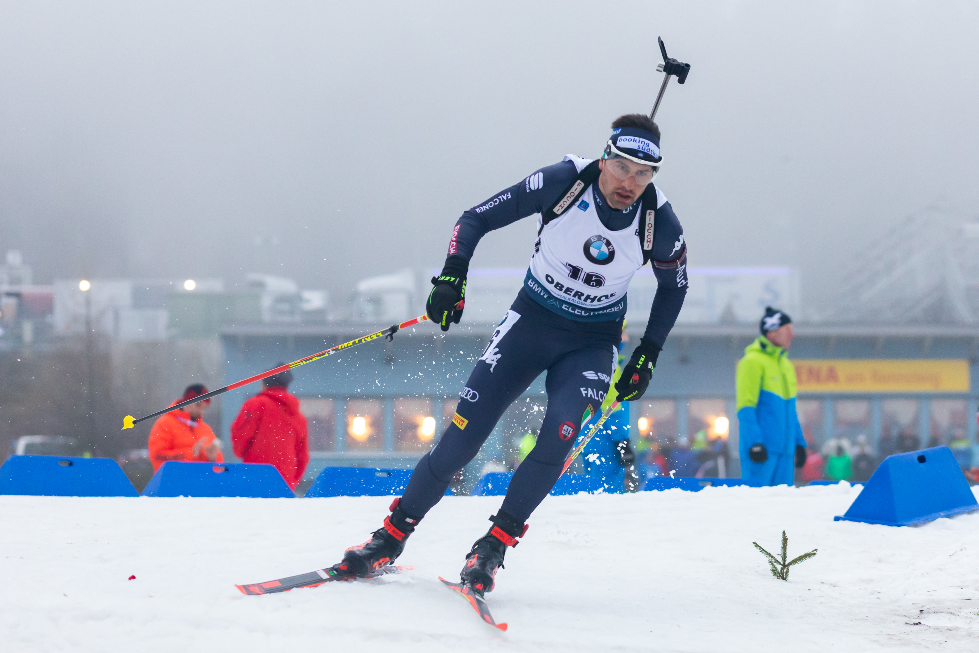 IBU World Cup Biathlon Oberhof; Dominik Windisch (ITA, Italien)